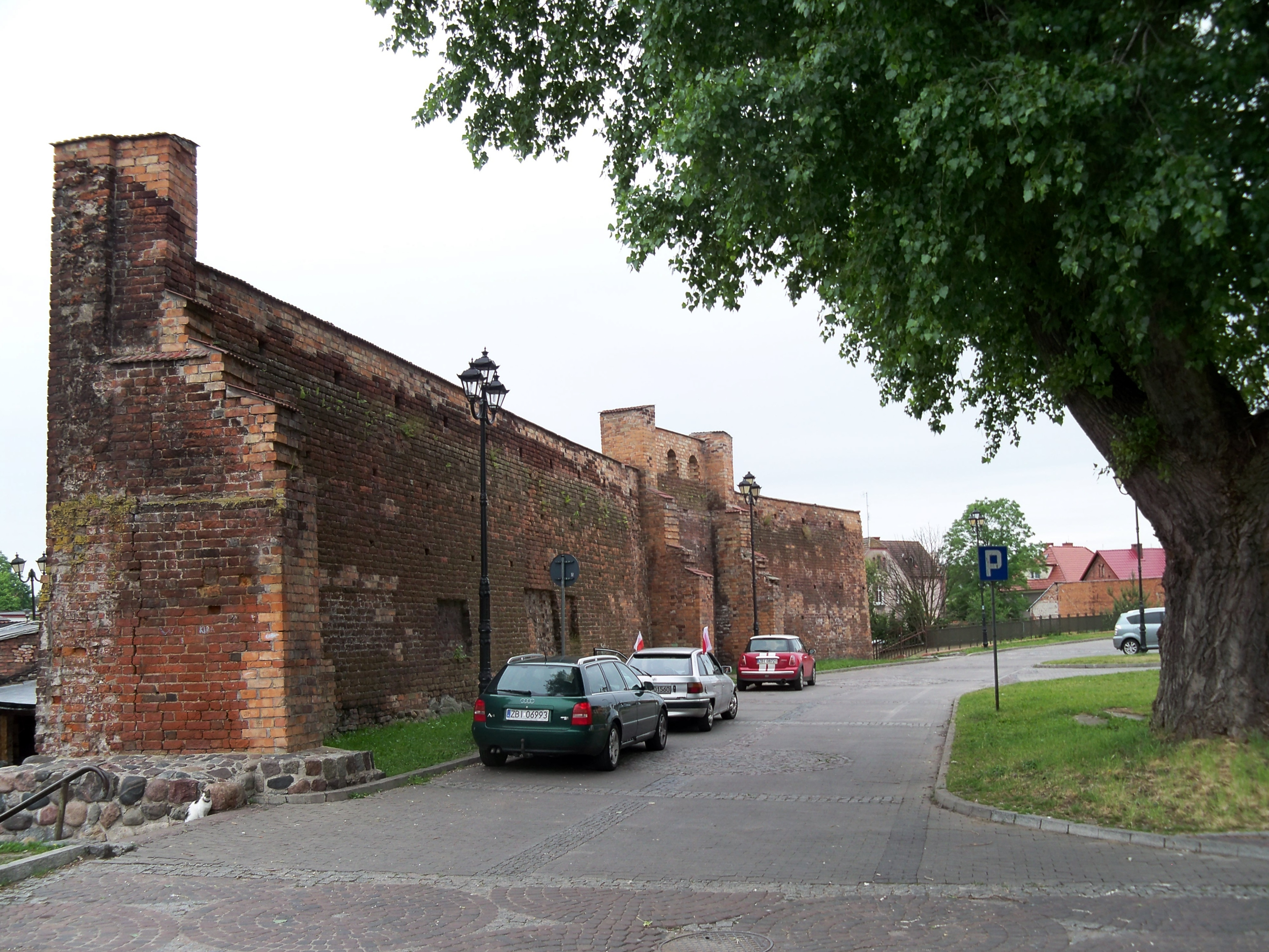 Białogard - fragment murów obronnych